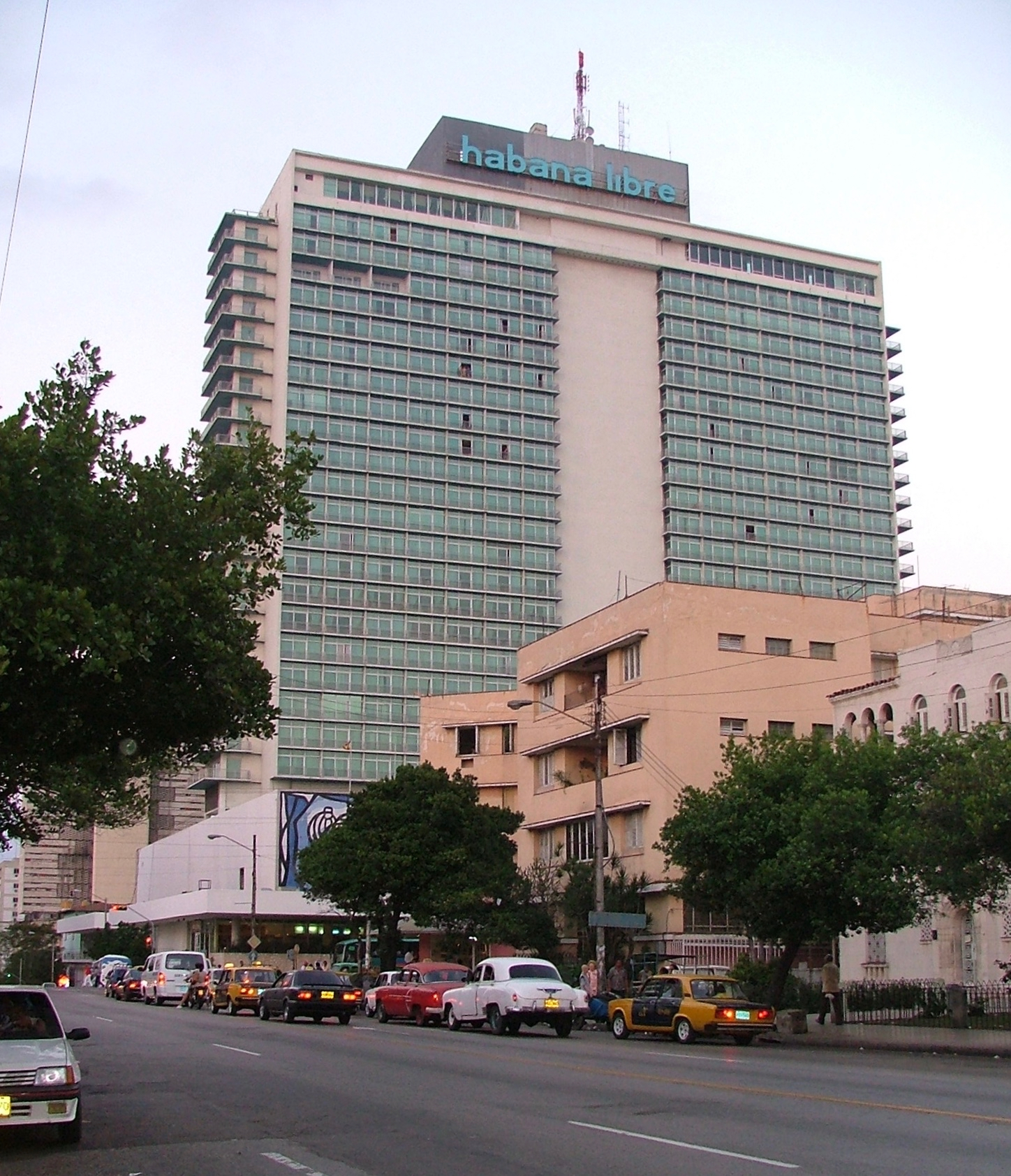 Hotel Habana Libre situado en la esquina más céntrica del Vedado